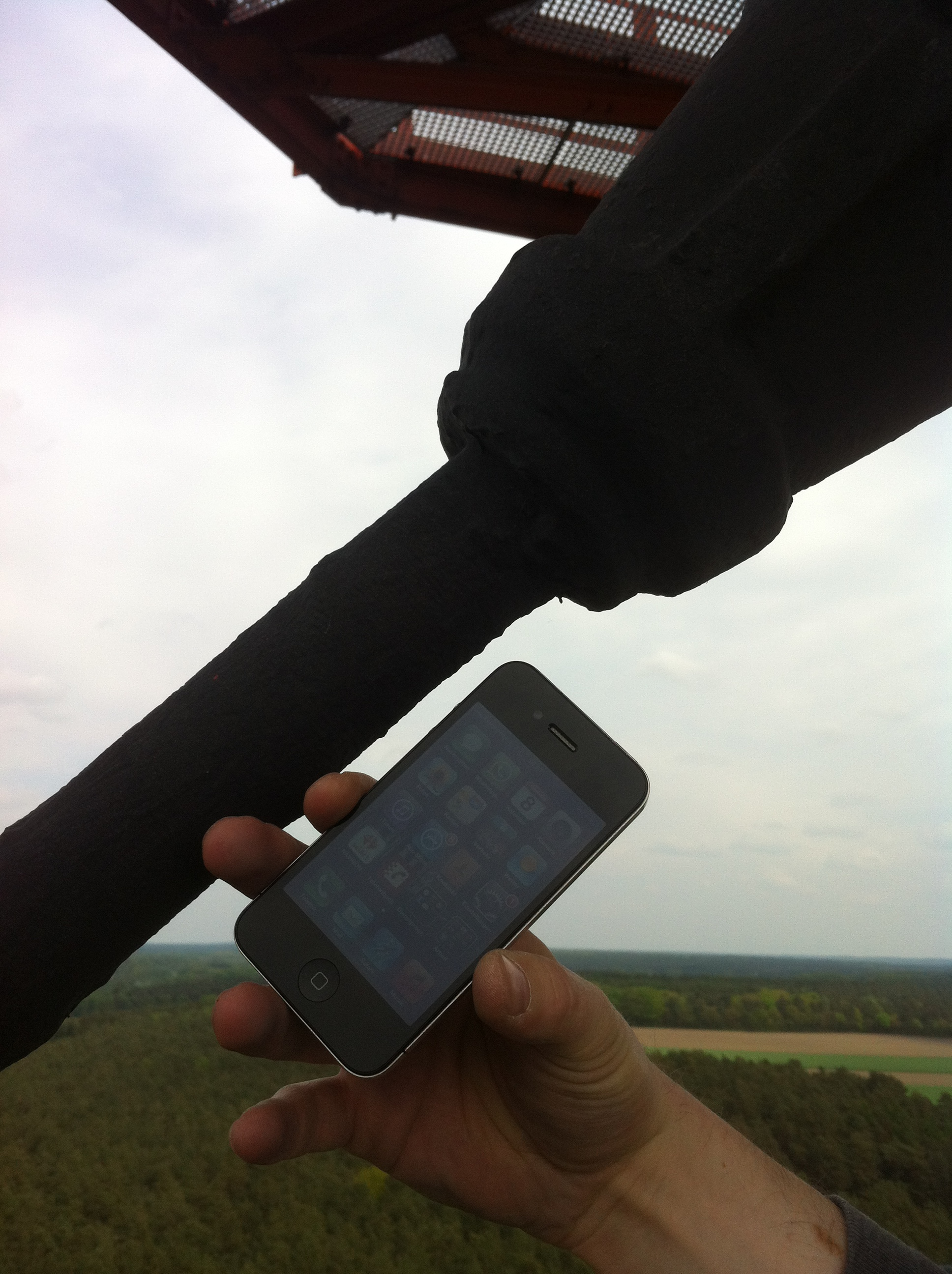 Größenvergleich Halteseil Sender Verden und iPhone